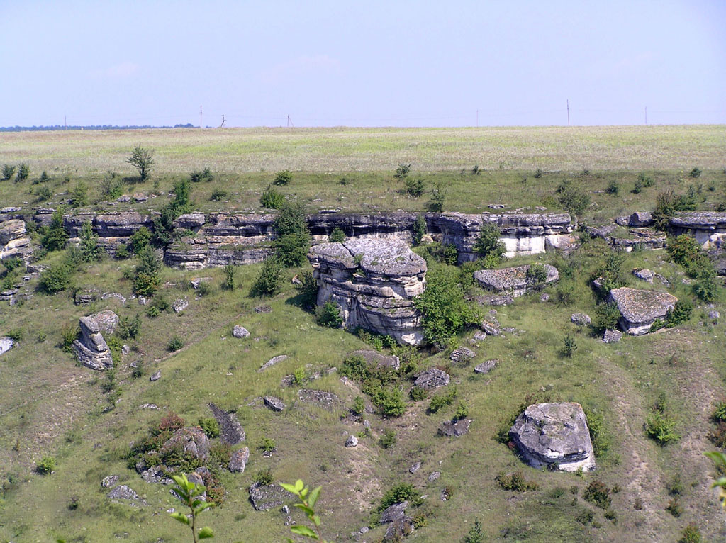 Опис:Каньйон р.ТупаАвтор:славікДжерело:фоткаЧас створення: 14.07.2010